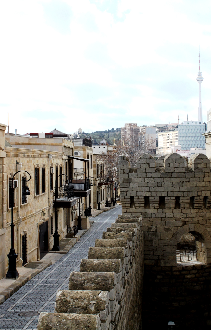 Старый город в Баку